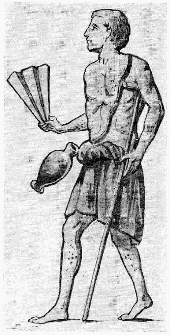 lépreux tenant la cliquette